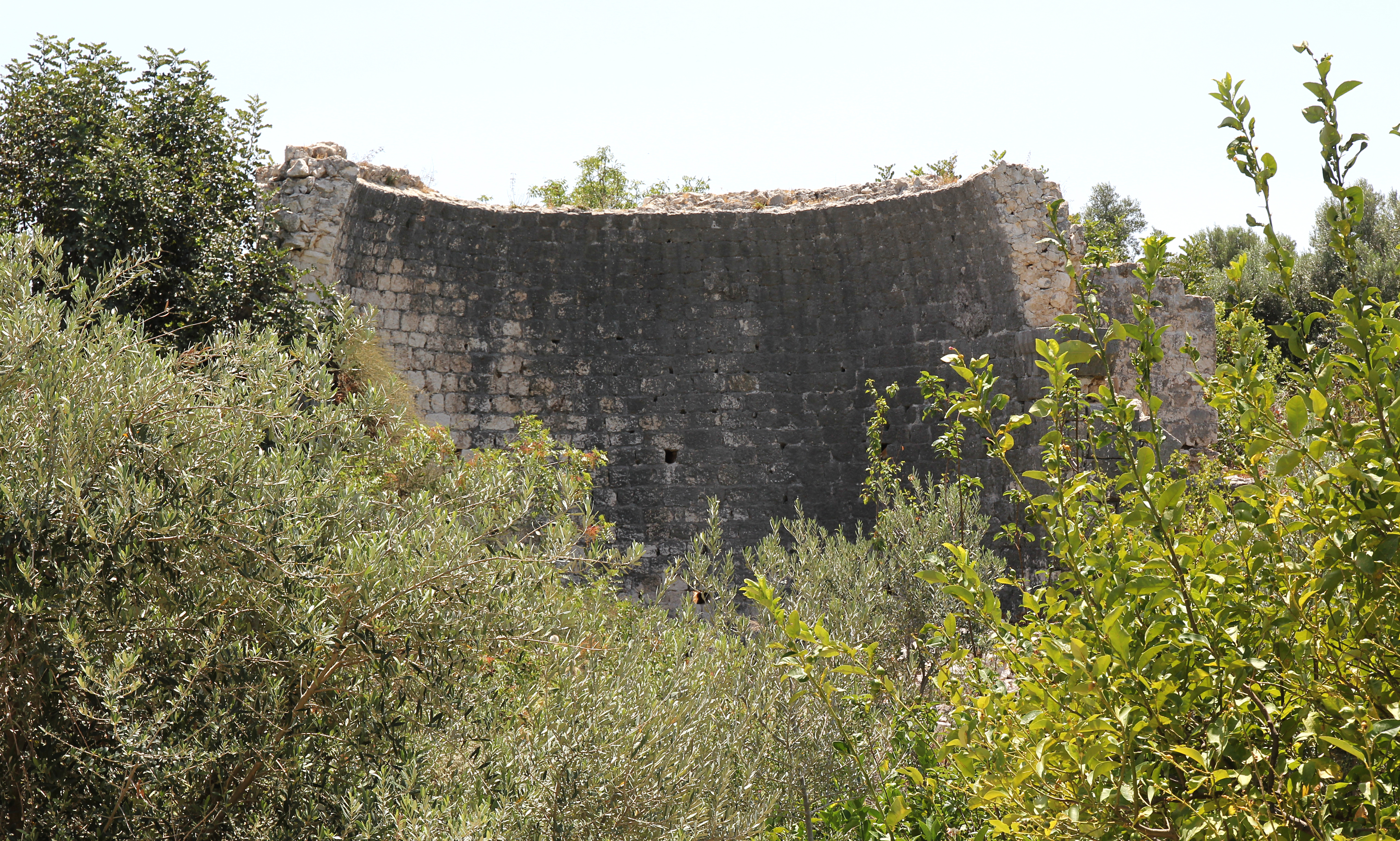 Korykos, archäologischer Fundort in der Südtürkei, westliche Kirche an der Stadtmauer, Apsis von Westen